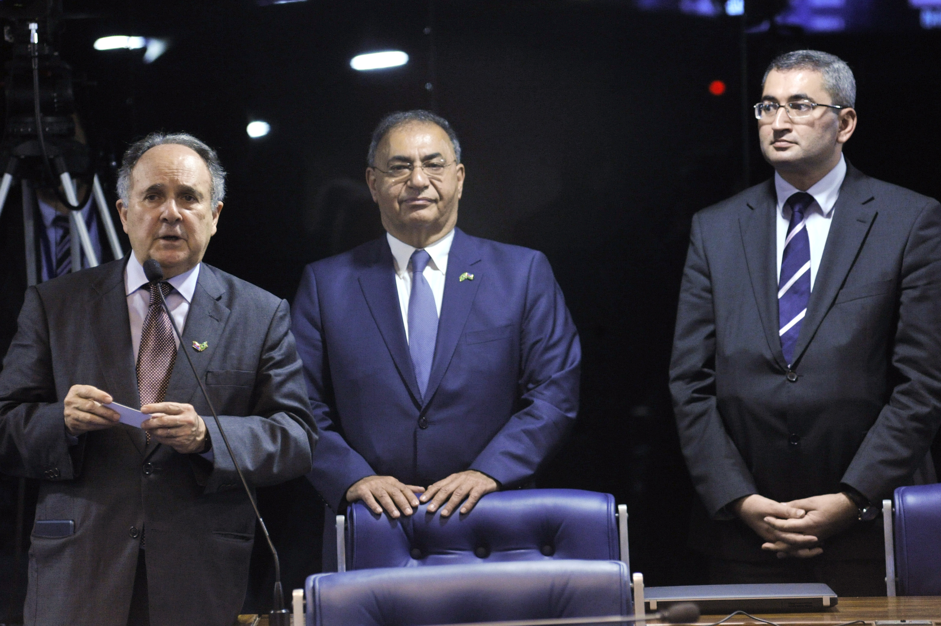 Plenário do Senado durante sessão deliberativa ordinária. Em pronunciamento, senador senador Cristovam Buarque (PDT-DF). (E/D): senador senador Cristovam Buarque (PDT-DF); médico neurologista Assimmollazade; embaixador do Azerbaijão no Brasil, Elnur Sultanov. Foto: Geraldo Magela/Agência Senado